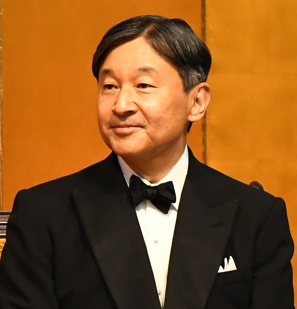 TICAD7に臨席した徳仁（第126代天皇）